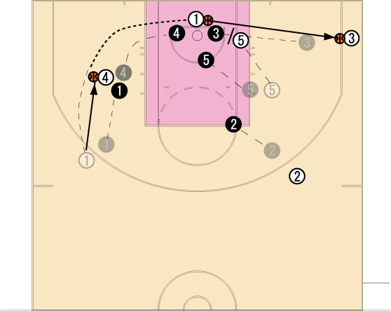 3point wide open